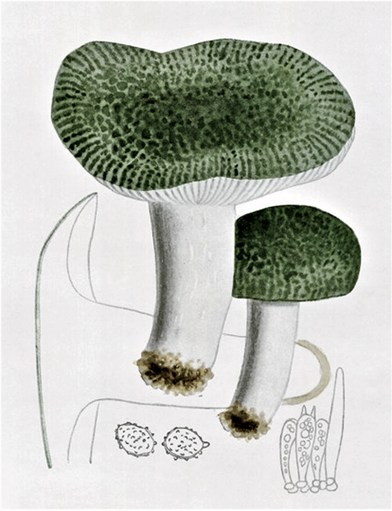 Giacomo Bresadola: Russula virescens (Schaeff., 1774) Fr. (1836)